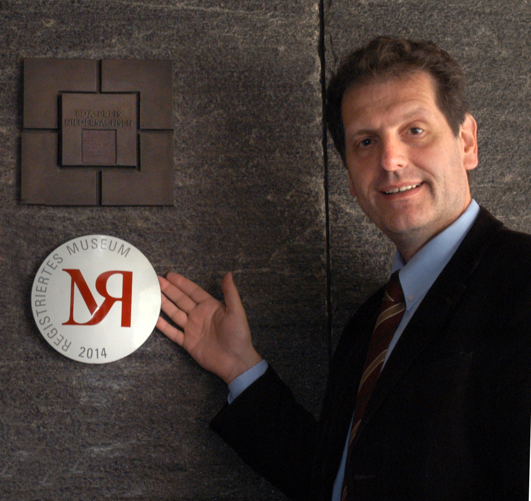 Thomas Schwark, hier nach erfolgter Zertifizierung des Historischen Museums Hannover als Registriertes Museum ...